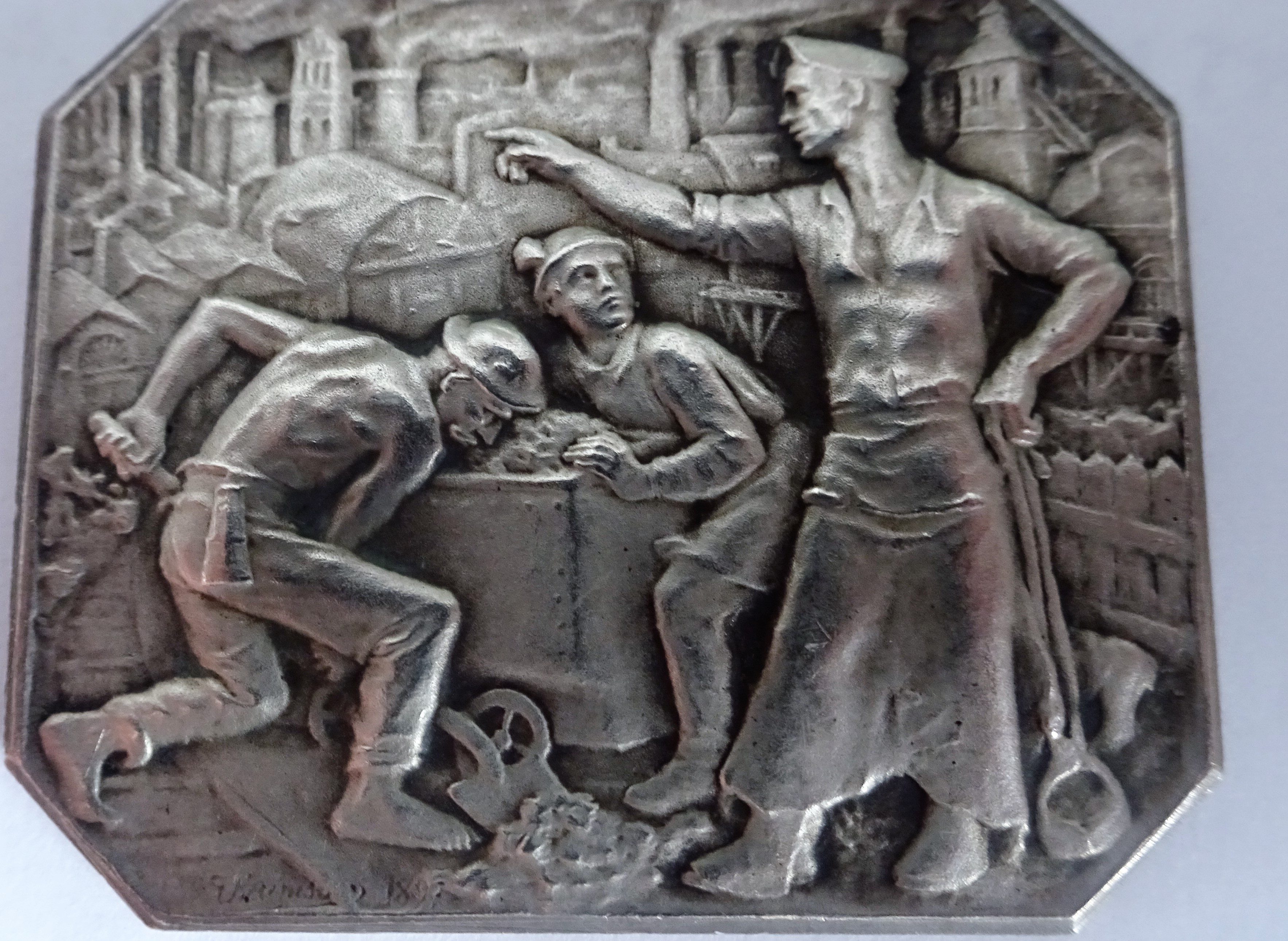 Plaque argent de 1897 du graveur Corneille Theunissen évoquant la Chambre de commerce et d'industrie Grand Hainaut crée en 1836